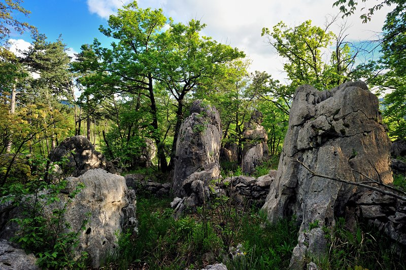 Živi muzej Krasa